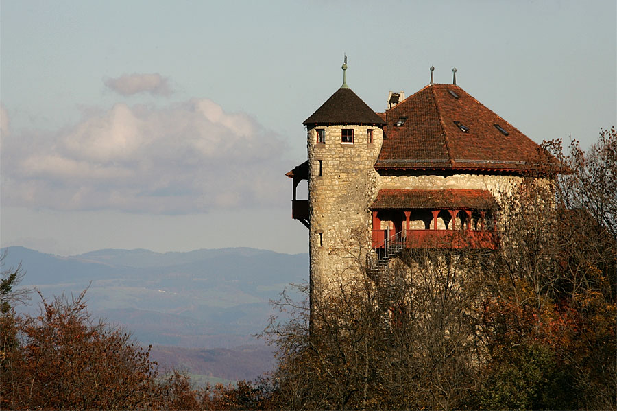 Burg Rotberg bei Metzerlen